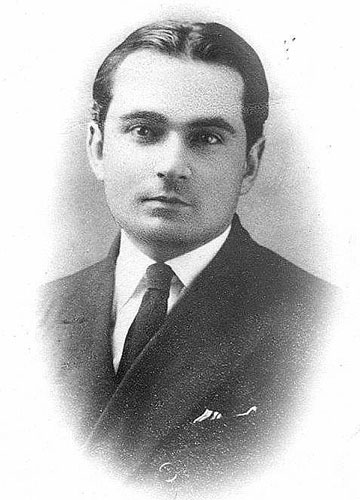 Un retrato de Jorge Basdre Grohman en 1924.